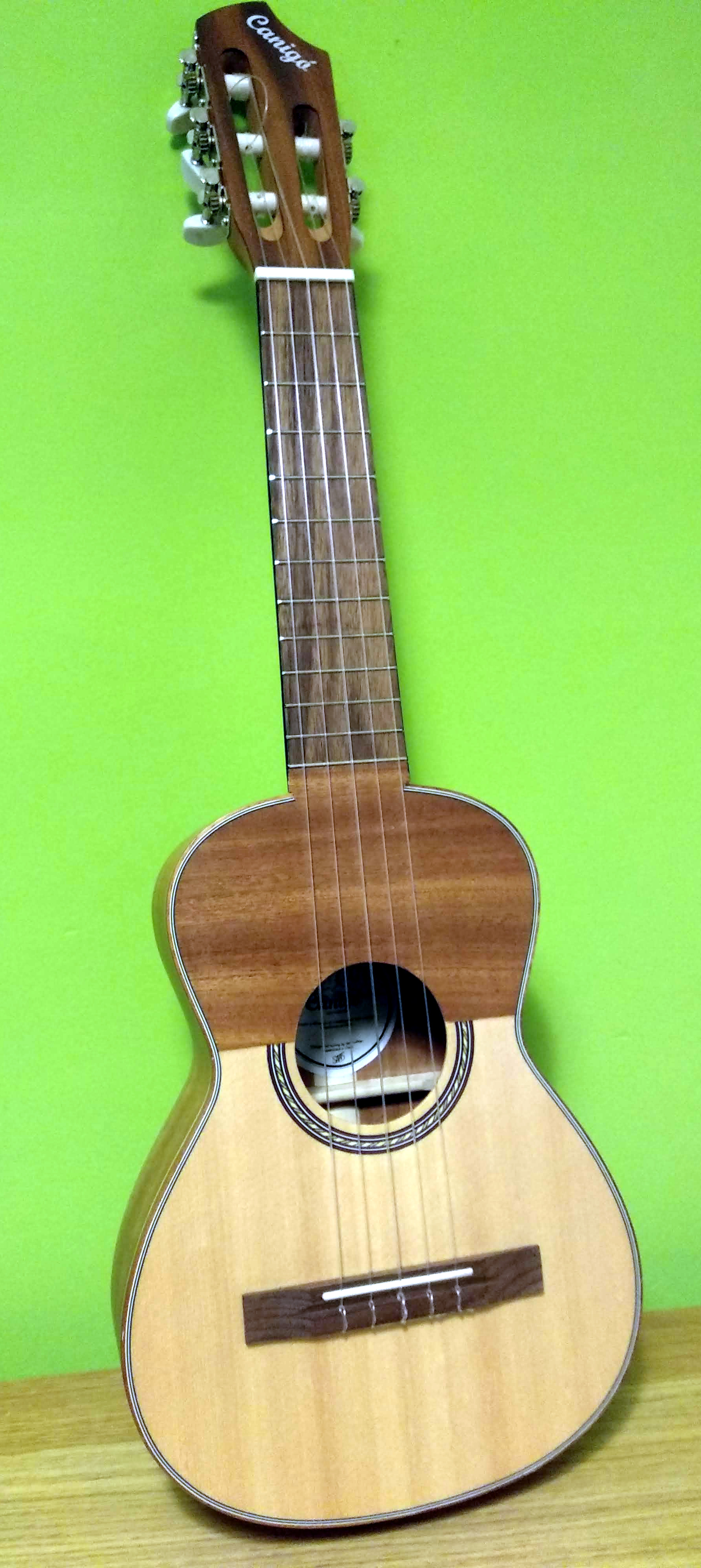 Guitarró femella marca Canigó